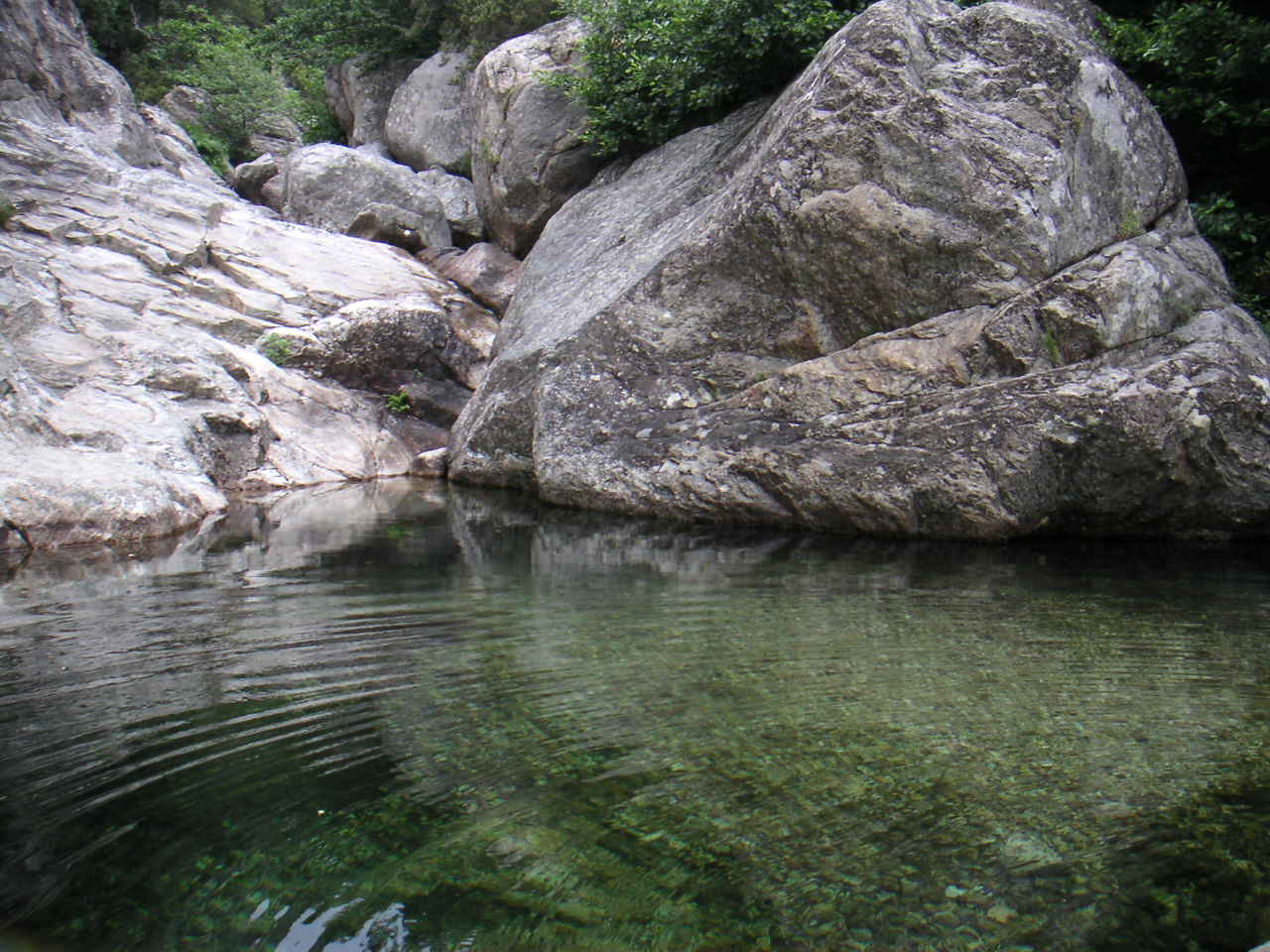 Gorges de Colombières - résevoir d'eau transparente Photo personnelle - TouN Prise en août 2004